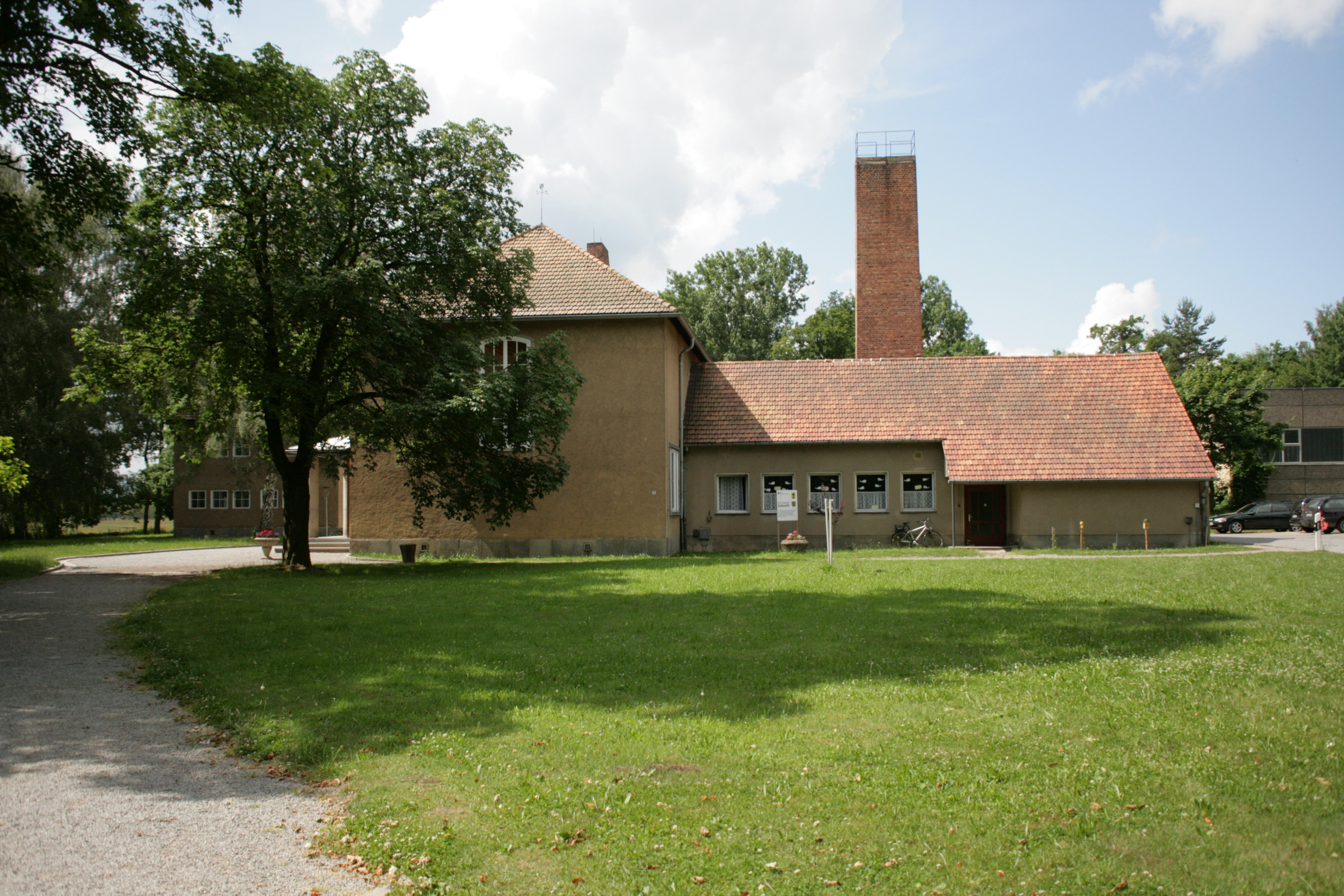 Grundschule, Am Park, Baruth bei Bautzen, Malschwitz